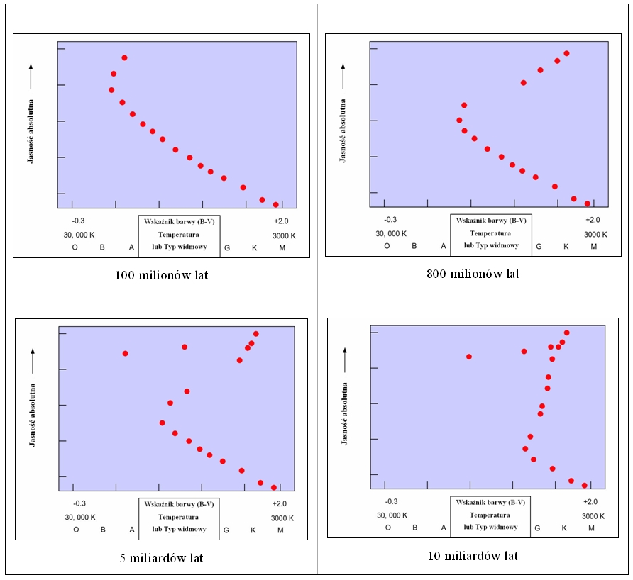 HR dla gromad